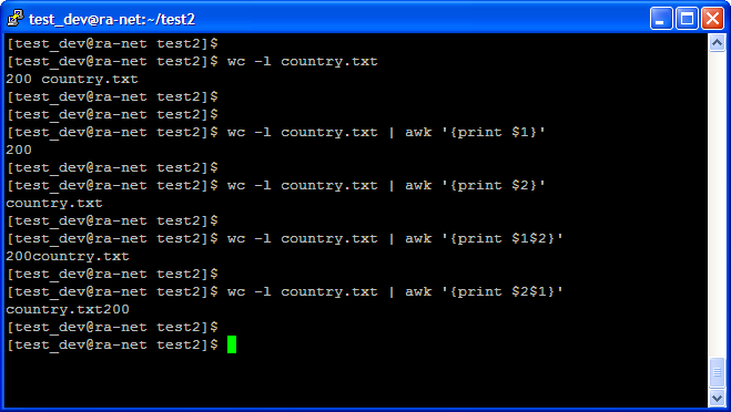 Монгол: командын тухай